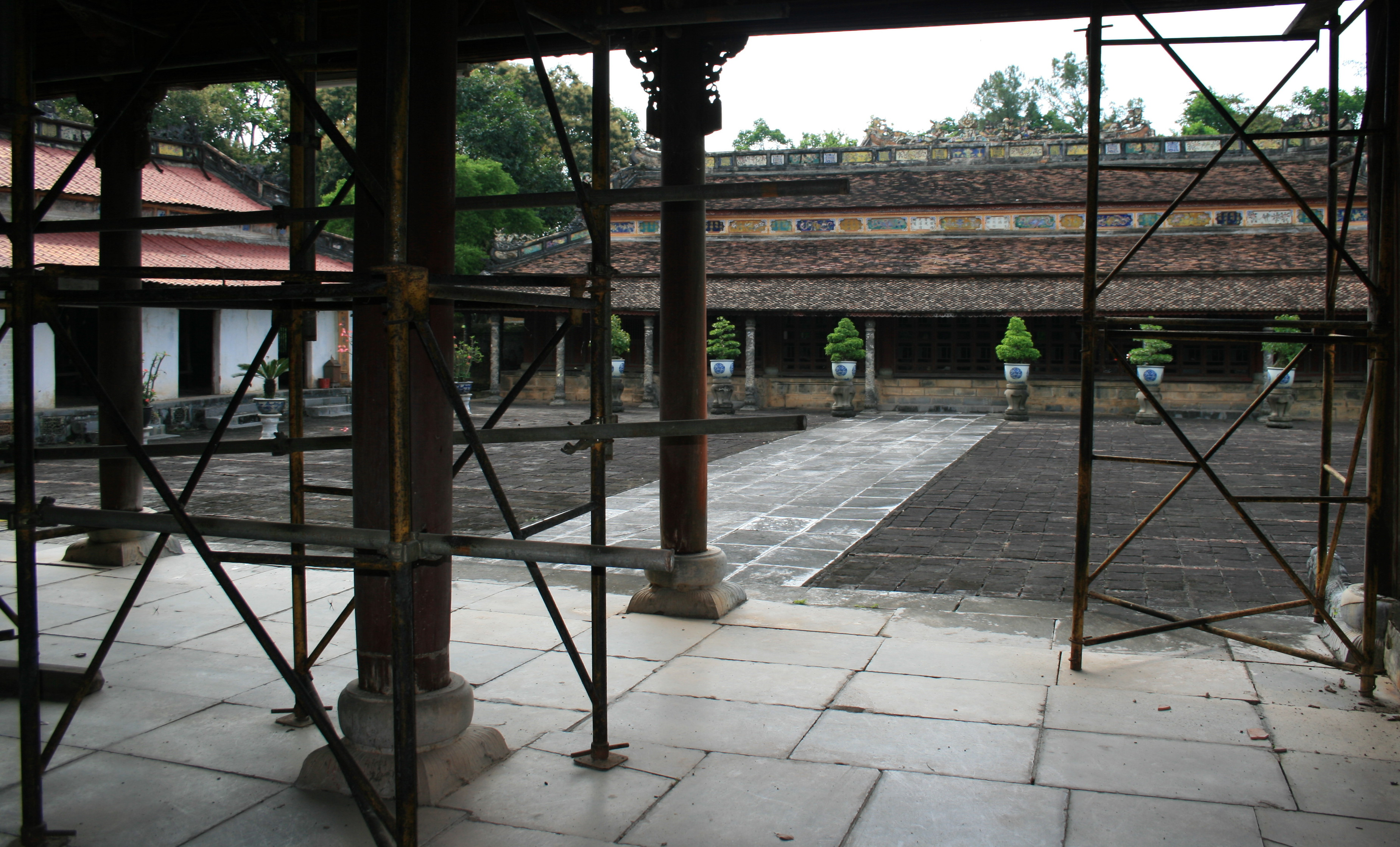 Tomb of DongKhanh (Ngưng Hi Điện và Minh Ân Viện)